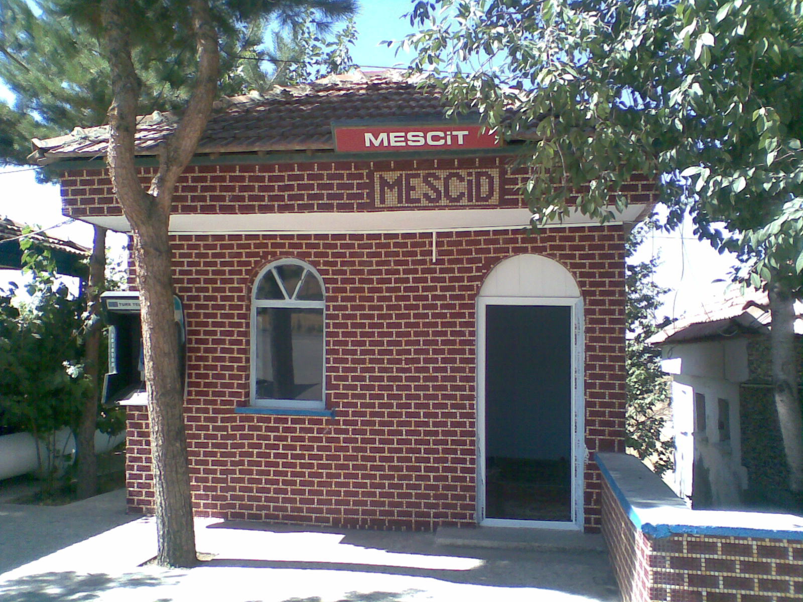 Mescit - Betraum an einer Tankstelle bei Malatya, Türkei